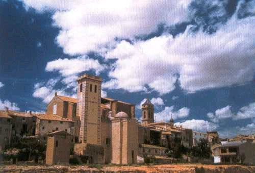 Barrio de La Villa (Requena).